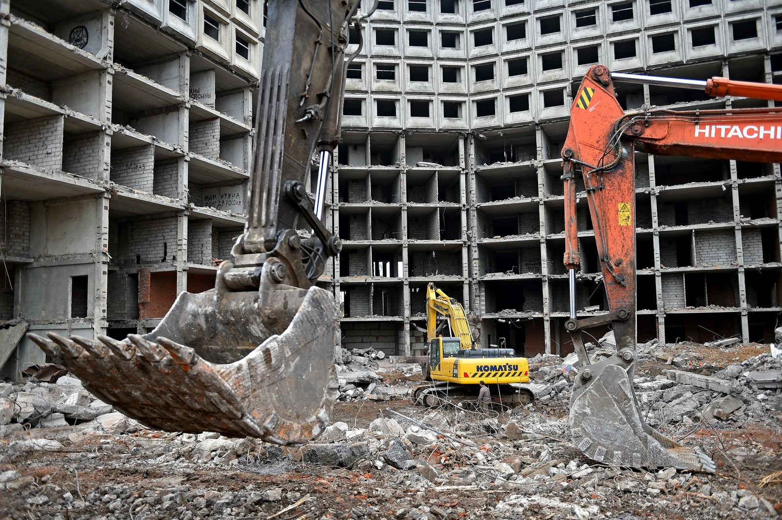 Снос Ховринской больницы